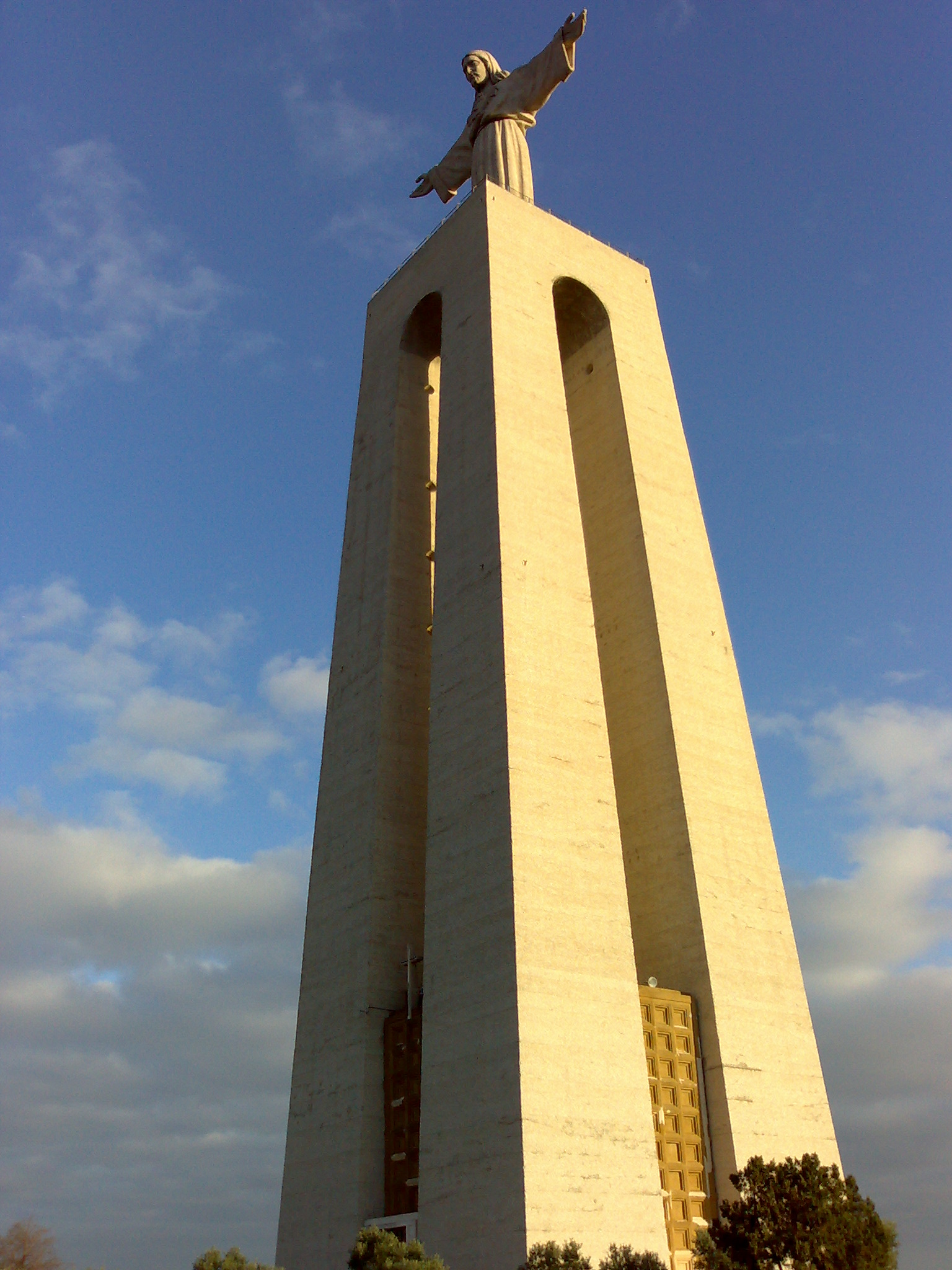 Cristo Rei (vista lateral), monumento de Almada, em Portugal.